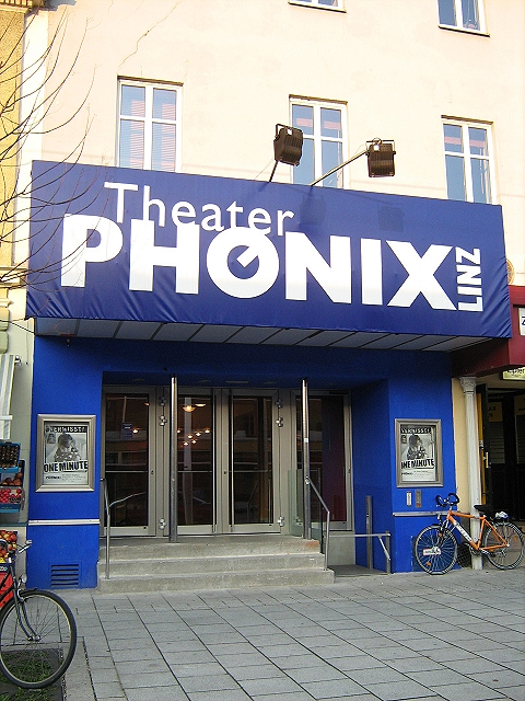 Theater Phönix, Linz, Austria